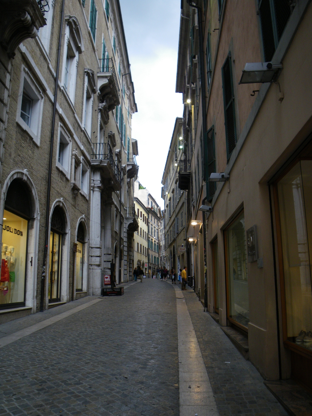 Corso Mazzini, ingresso vicino al porto, ad Ancona, Italia.